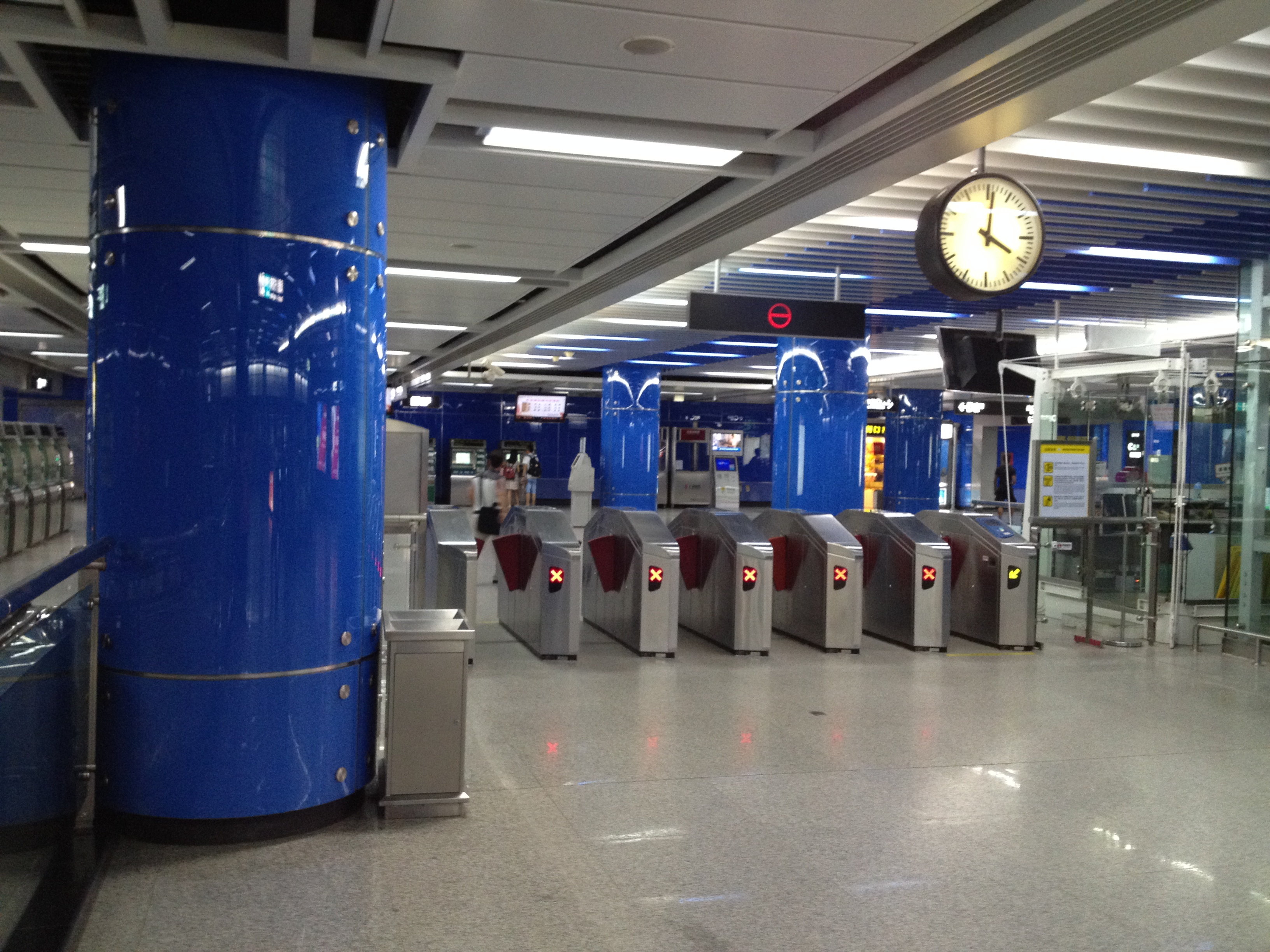 广州地铁万胜围站北站厅